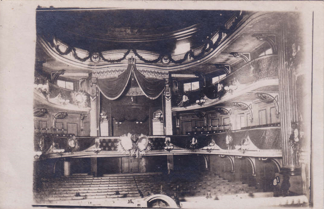 Potsdam, Schauspielhaus, Innenansicht in festlichem Schmuck